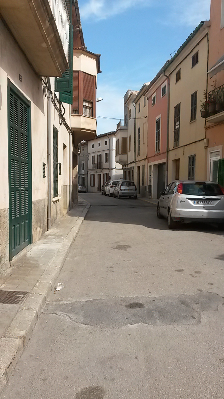 ubicacion de Can Valella, tipo de Toponimia